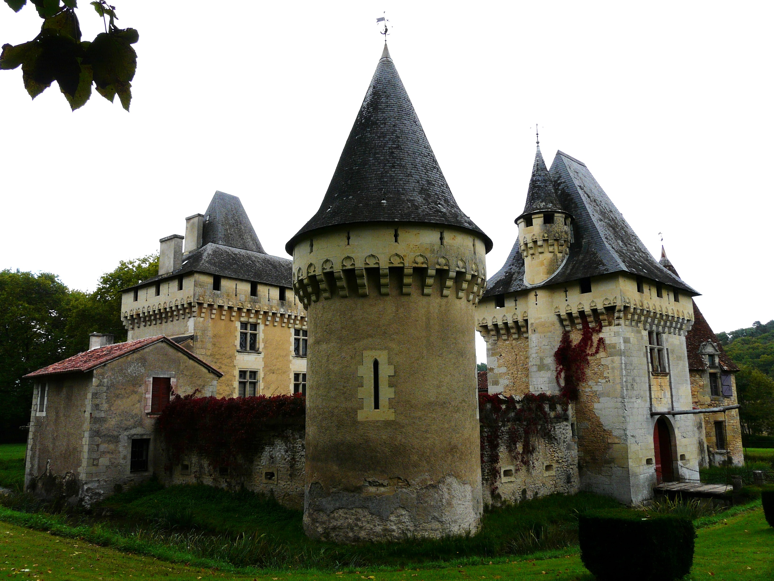 Château du Lieu-Dieu, Boulazac, Dordogne, France